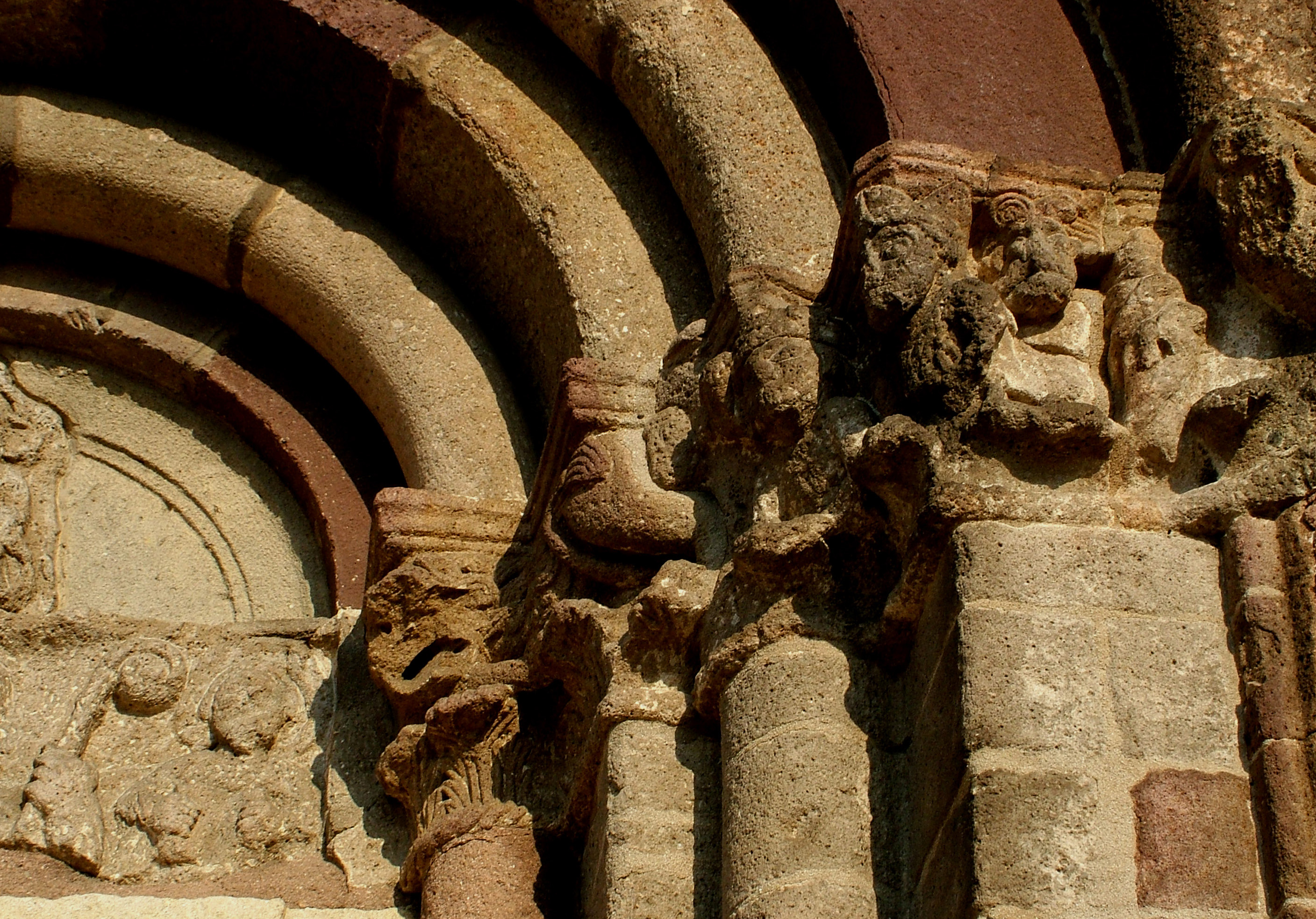 A felsőörsi Mária Magdolna-templom kapubélletének oszlopfői